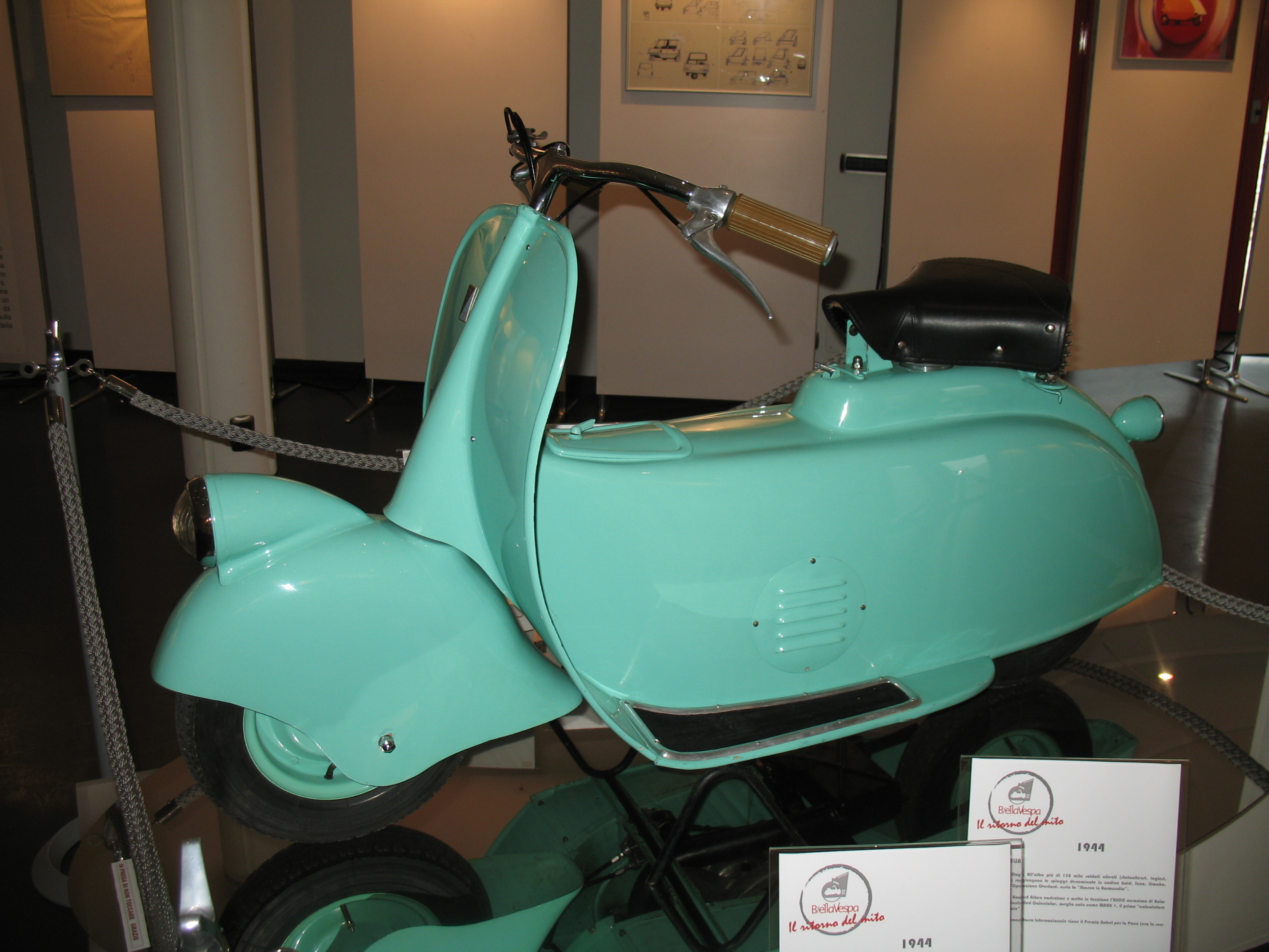 Biella, Palazzo Boglietti Mostra "BiellaVespa - Il ritorno del mito" - Modello originale di MP5 Piaggio Paperino (1944)